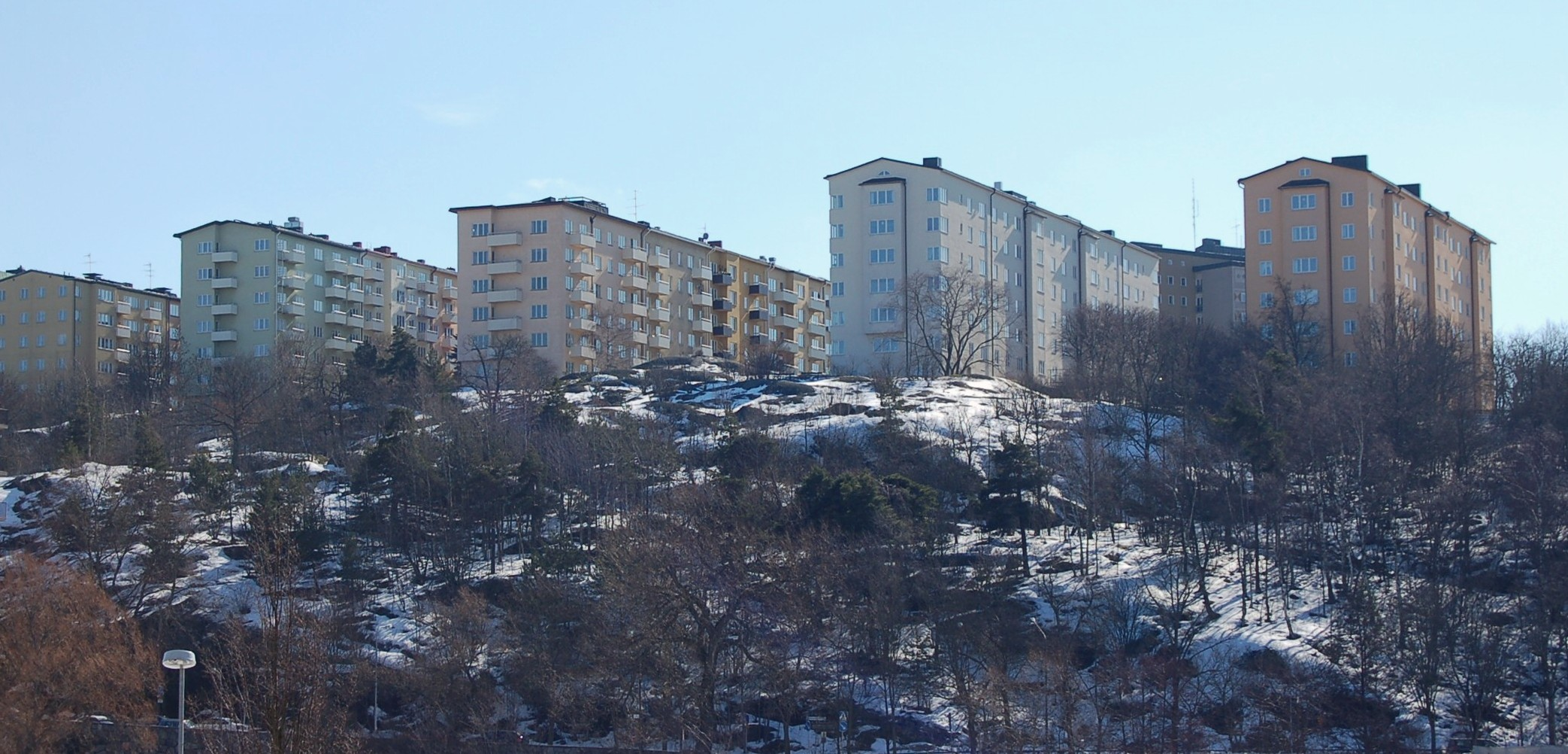 Stadshagens bergshöjd i Stockholm. Vy från Karlberg.